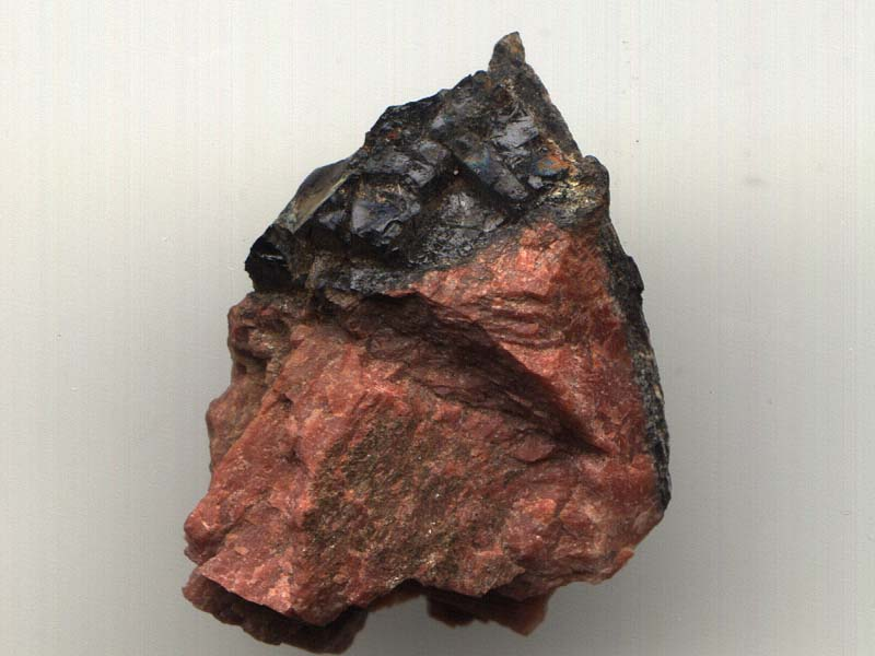 Ši nuotrauka daryta 2003 m. birželio mėn. lankantis Montanoje, JAV, lankantis mineralų muziejuje, tik šiek tiek pakoreguota su programomis, fotografuota su OLYMPUS C-480 fotoaparatu.